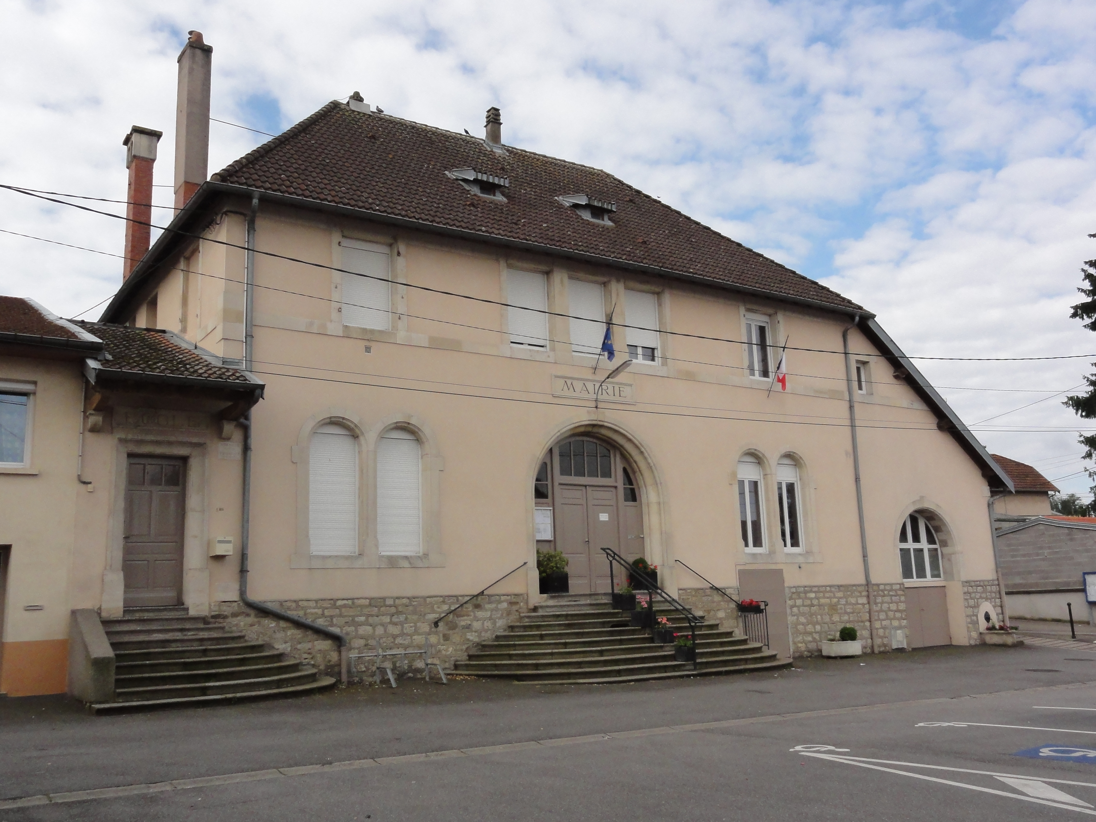 Chanteheux (M-et-M) mairie